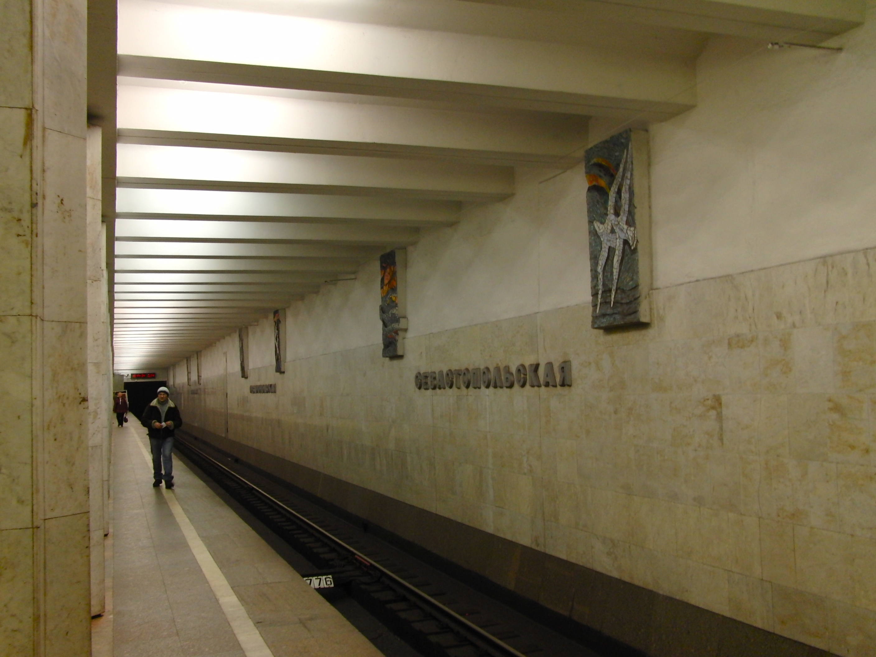 Sevastopolskaya (Севастопольская)